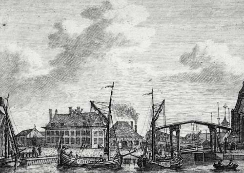 voc_zeemagazin_middelburg_18de-eeuw